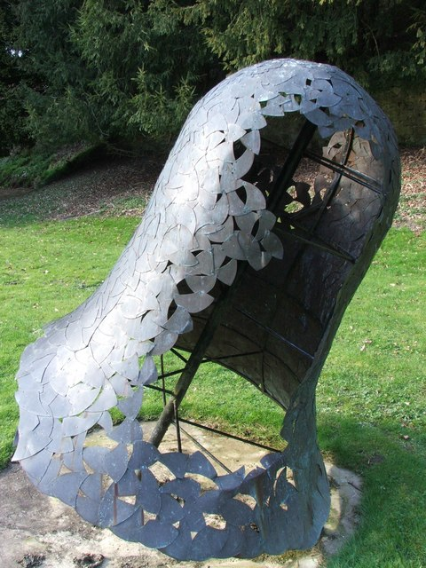 Brinkburn Bell